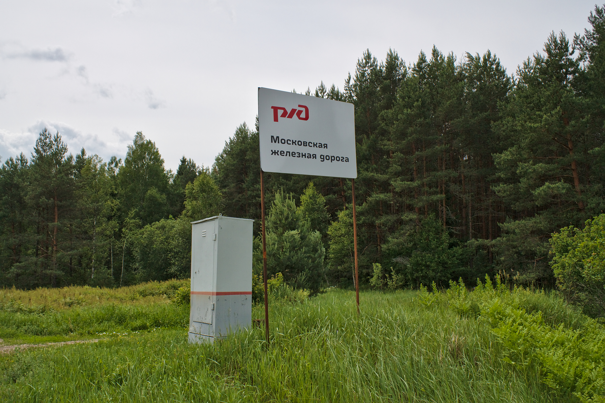 Табличка РЖД, обозначающая границу Московской железной дороги с Белорусской ЖД. см. фото 601060 в альбоме автора